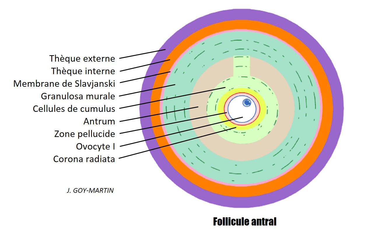 Follicule antral. De J. GOY-MARTIN